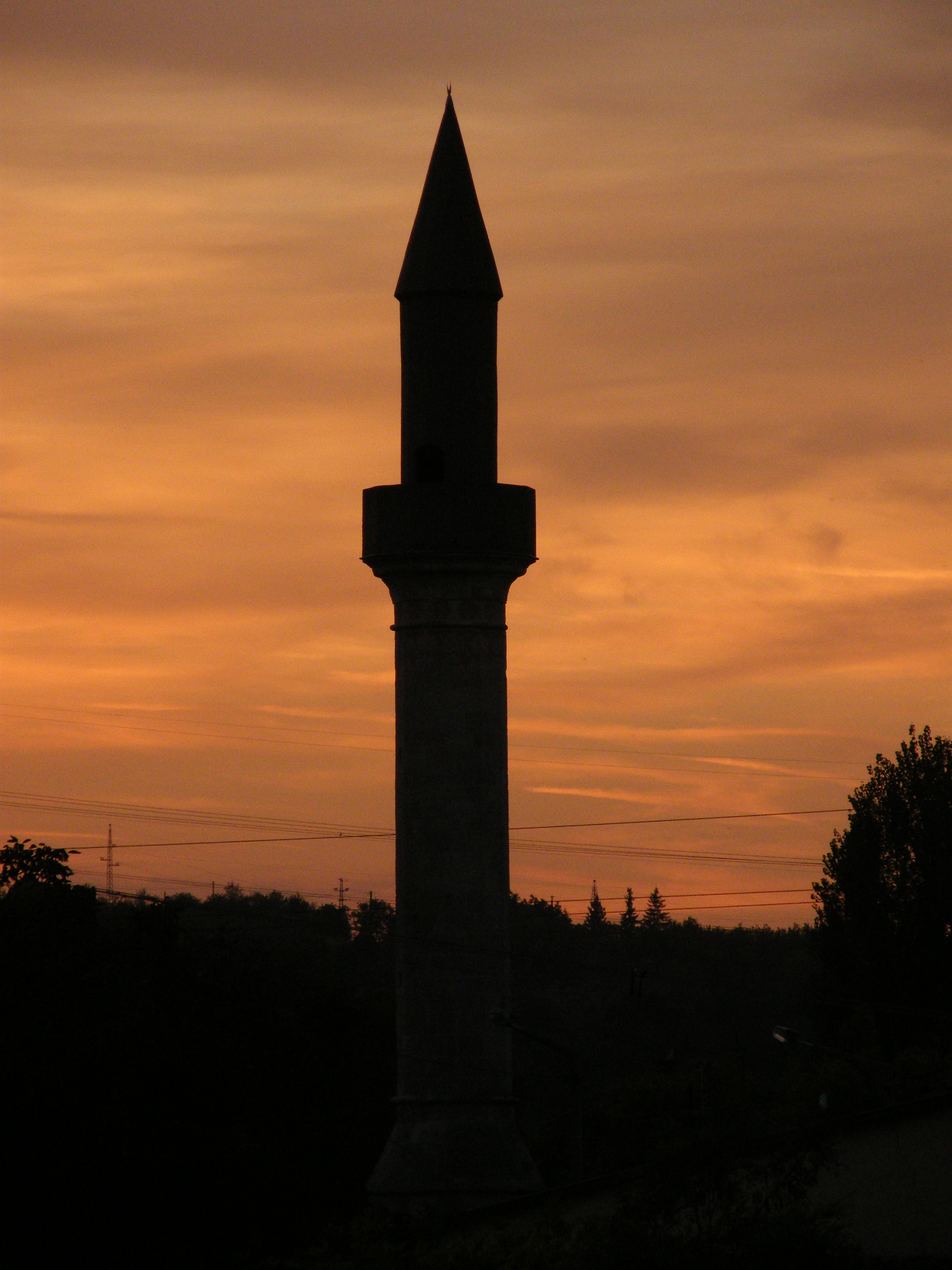 Minaret (Érd, Mecset u.) This is a photo of a monument in Hungary, Identifier: 7014